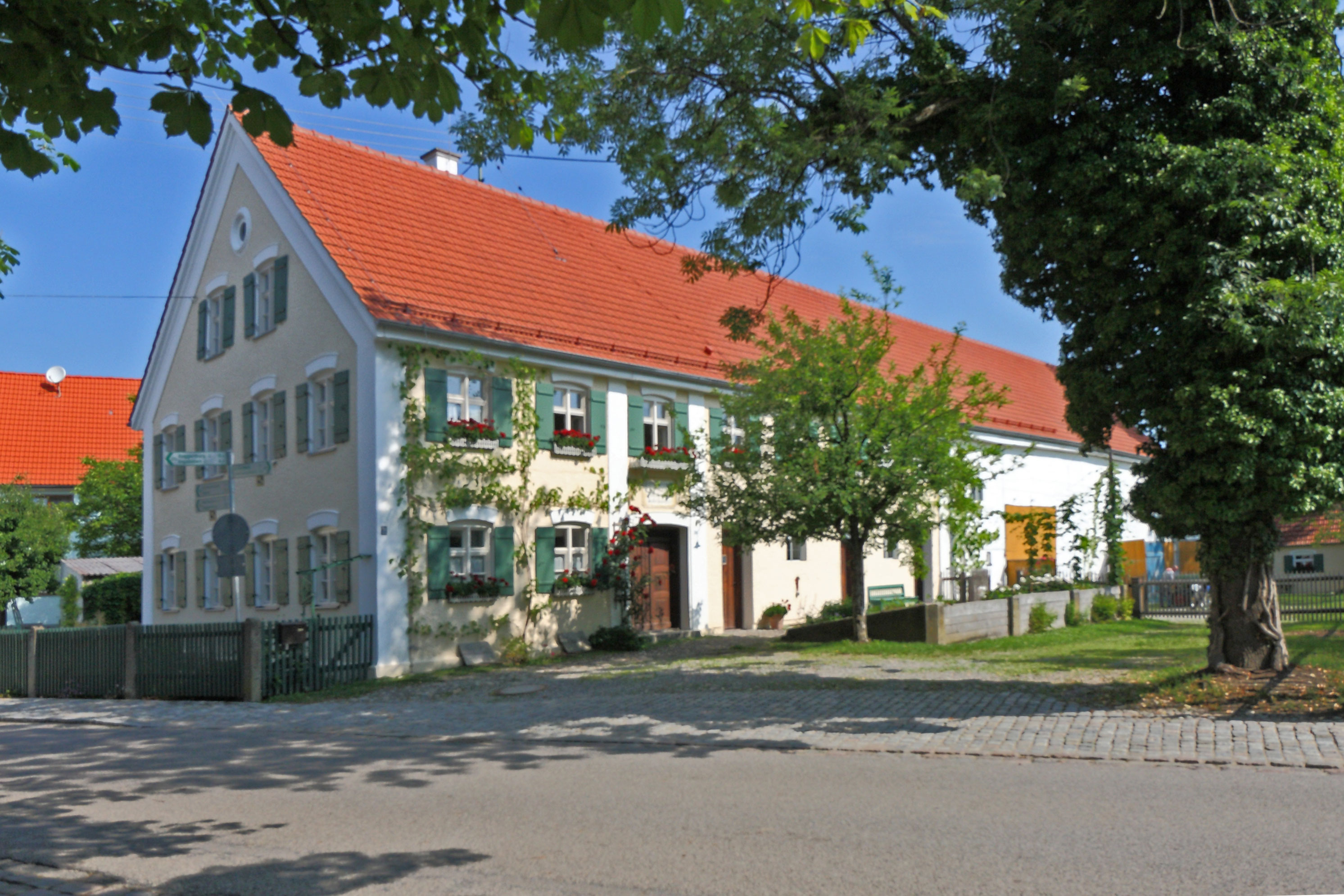 Stoffenried, Schwaningerstraße 20; um 1875 erbauter, ehemaliger Bauernhof, der um 1990 in den ursprünglichen Zustand zurückgeführt wurde und zum Freilichtmuseum "Kreisheimatstube" gehört